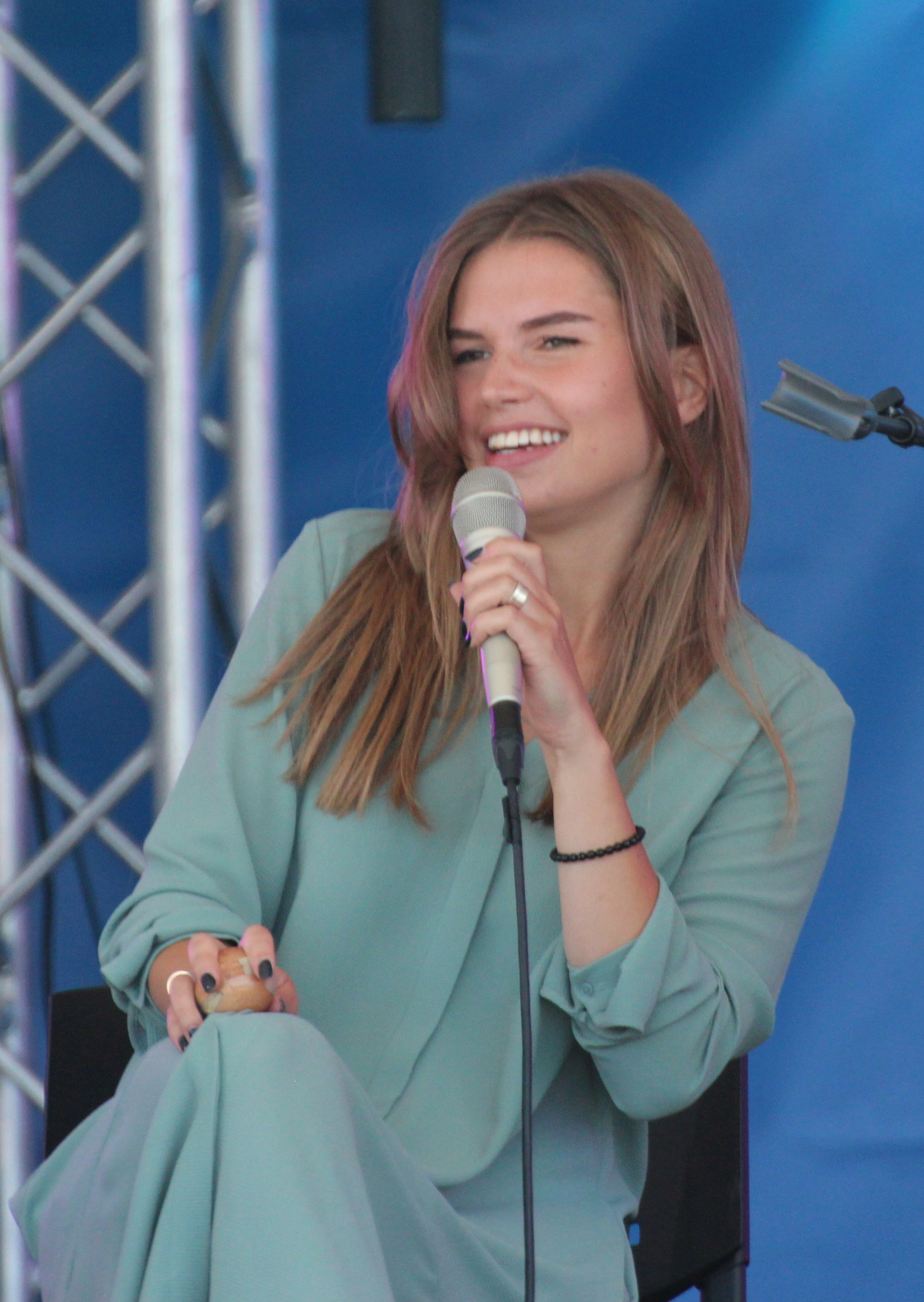 Marie Vaigla esinemas Haven Kakumäe laval Tallinna Merepäevadel